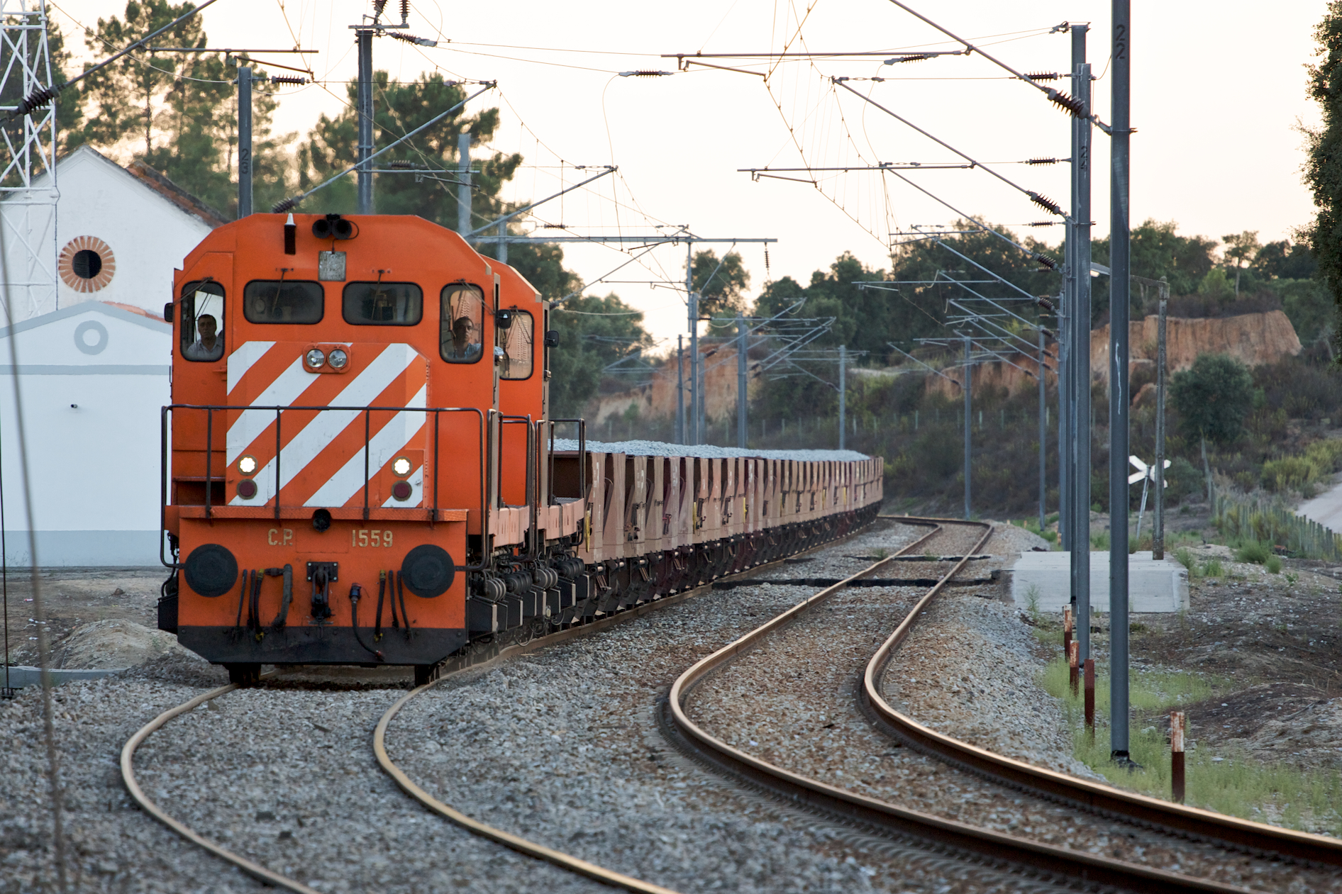 Tipo: Comboio de Transporte de Balastro 96220 [Torre da Gadanha - Entroncamento] Local: Estação de Canha [Linha de Vendas Novas, PK 57] Data e hora: 25 de Setembro de 2009 [18h40] Material: Locomotivas 1559 e 1553 + xx vagões CP Us